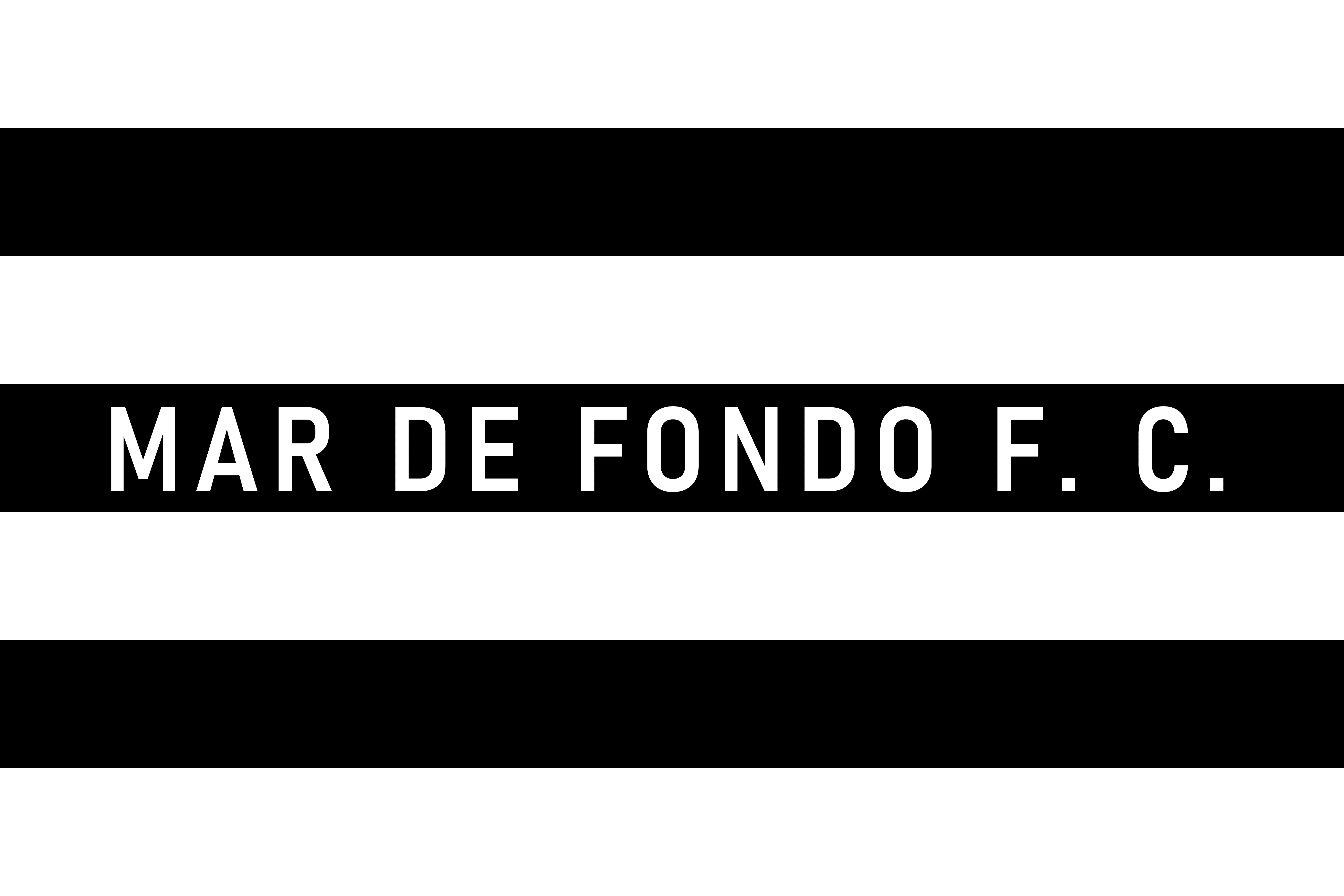 Bandera del Club Atlético Mar de Fondo